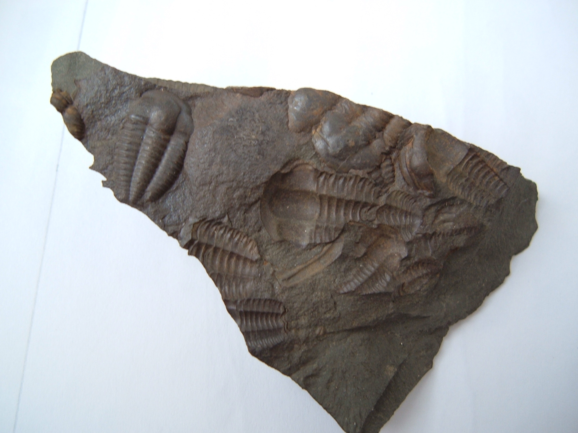 Ellipsocephalus hoffi